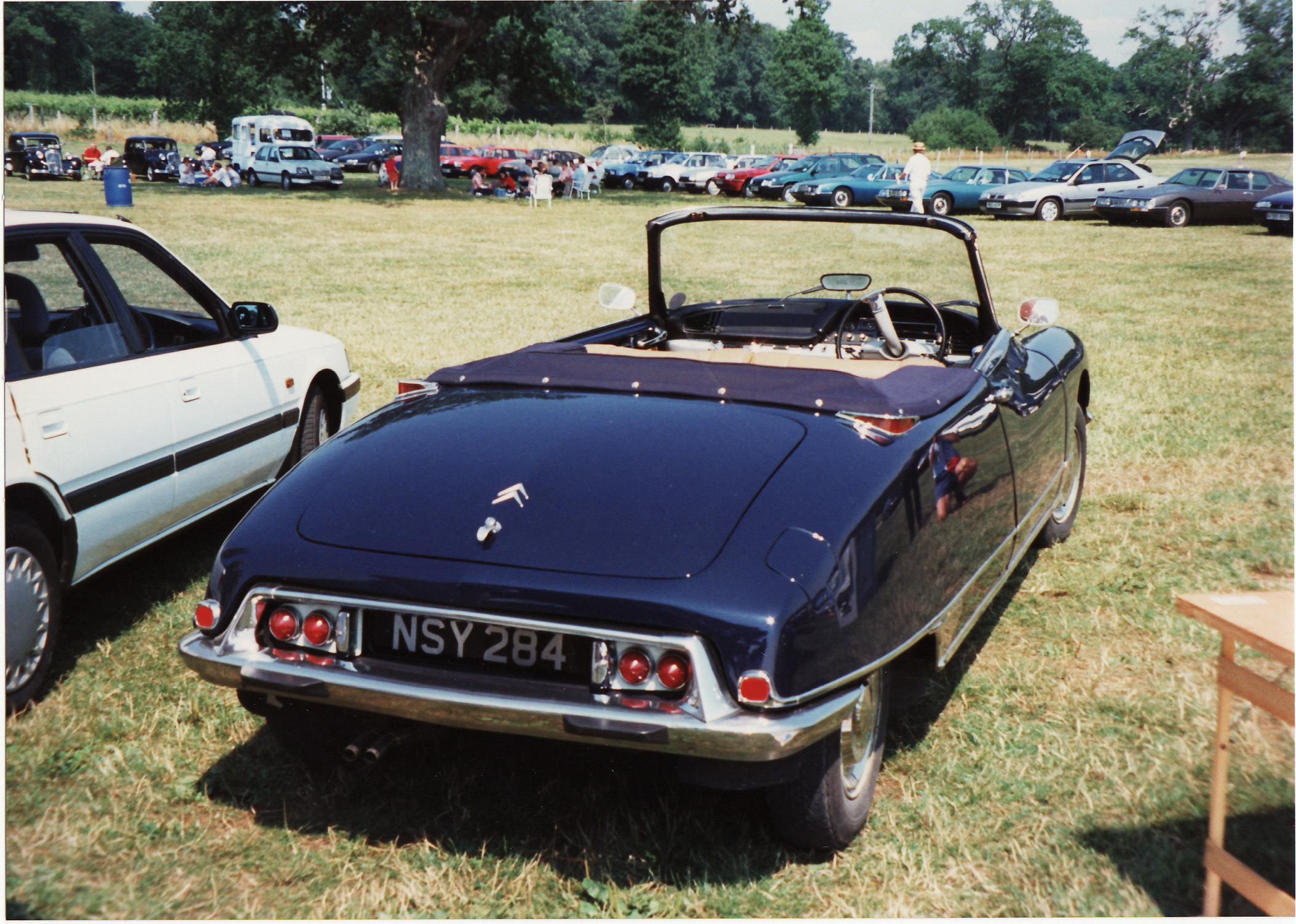 at Beaulieu Fench car meet Gorgeous!